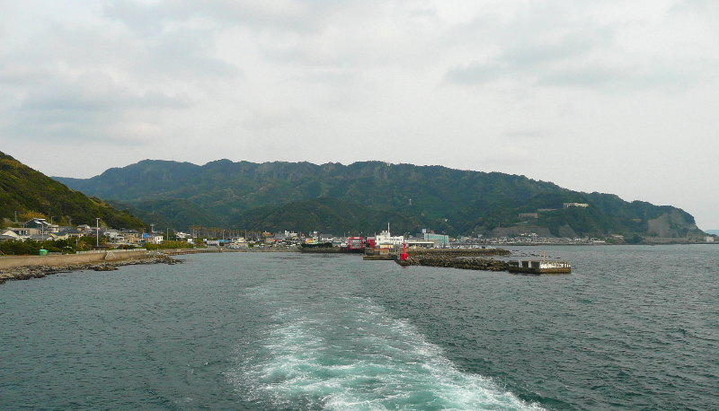 金谷港 正面に見える山は鋸山 出港する東京湾フェリーから撮影